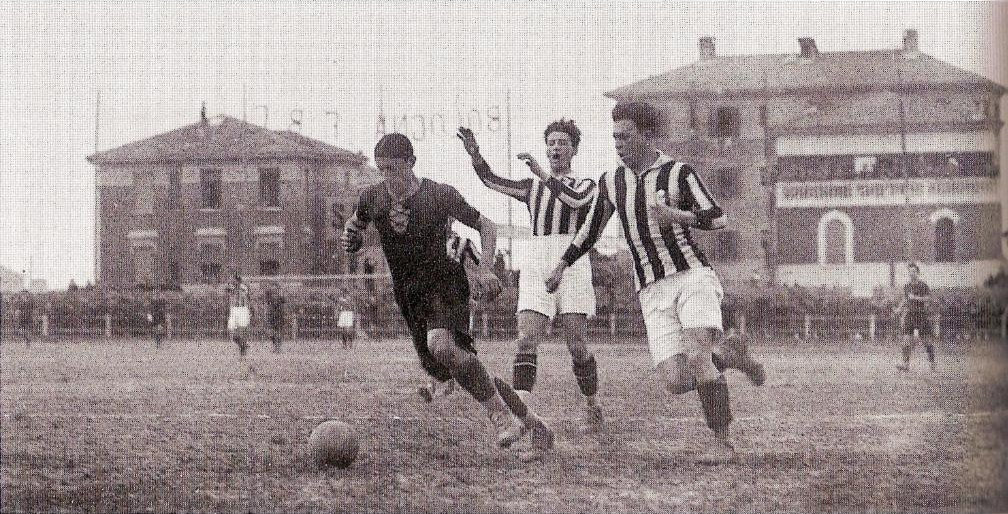 Bologna (Italia), stadio Sterlino, 27 marzo 1927. Il centravanti bolognese Angelo Schiavio (a sinistra) elude l'intervento dei difensori juventini Virginio Rosetta (a destra) e Luigi Allemandi (sullo sfondo) nella sfida tra Bologna F.C. e F.B.C. Juventus (1-0), 1ª giornata del girone finale valevole per l'assegnazione del campionato italiano di Divisione Nazionale 1926-27.